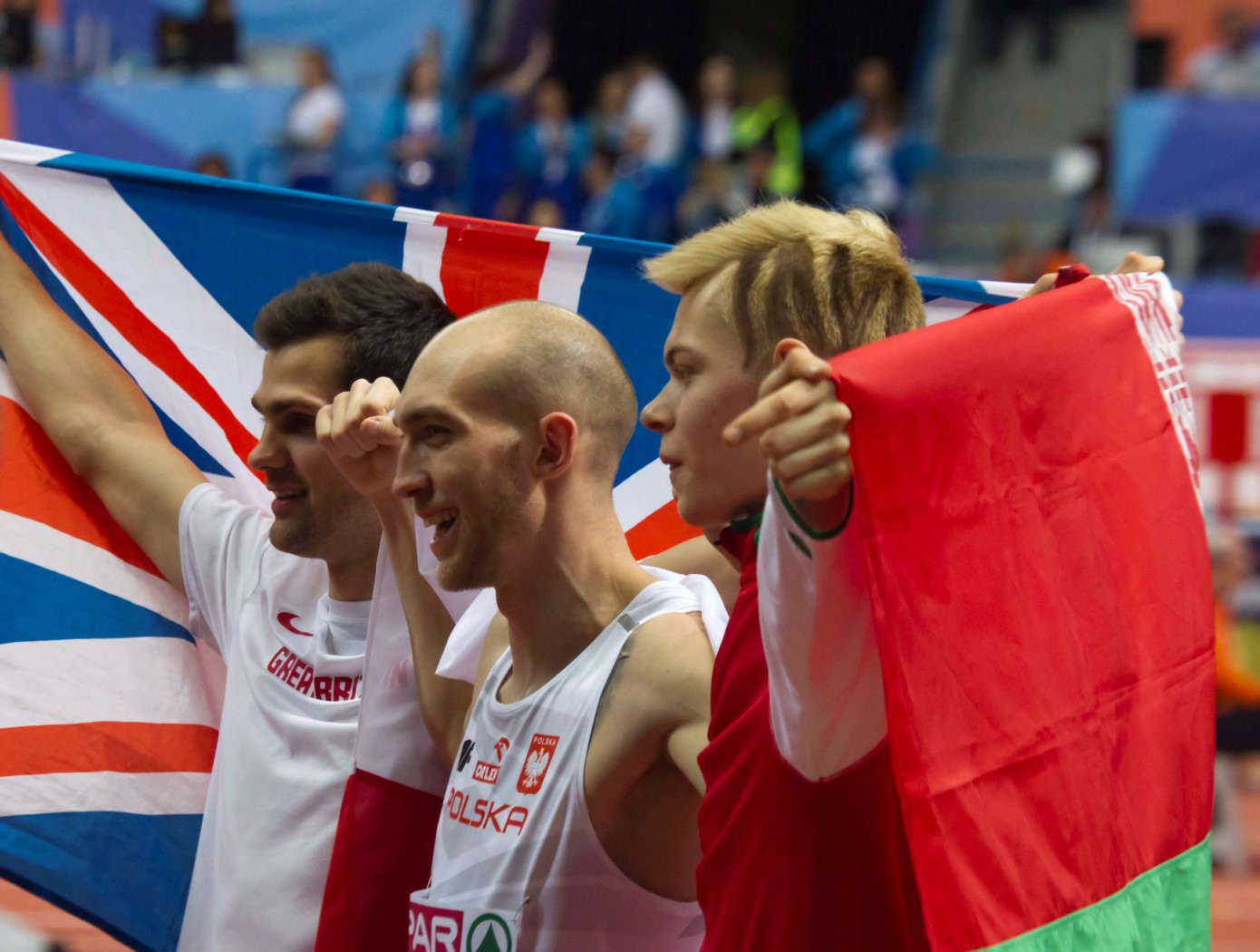 412 podium hoog m